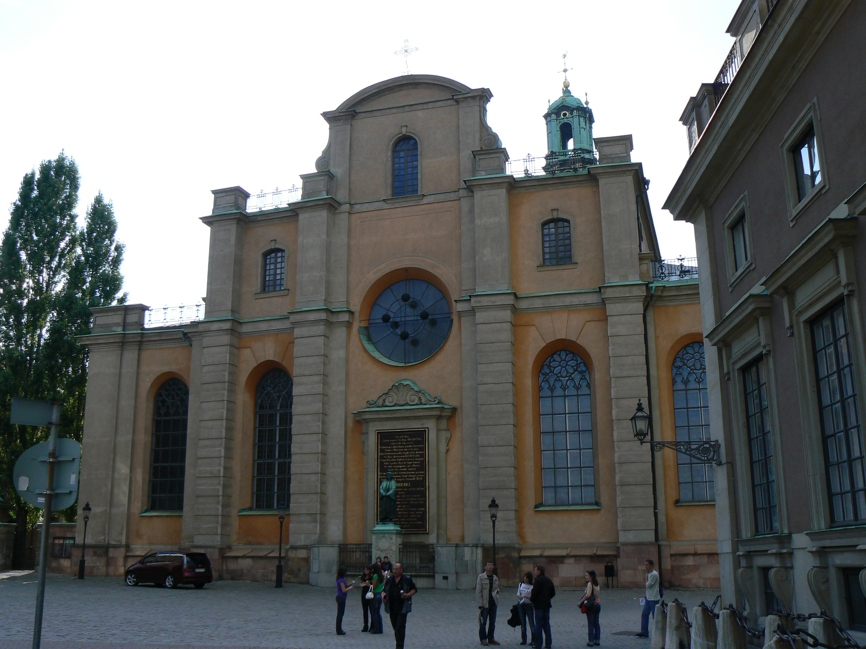 Sztokholmska katedra to świątynia szwedzkiej rodziny królewskiej